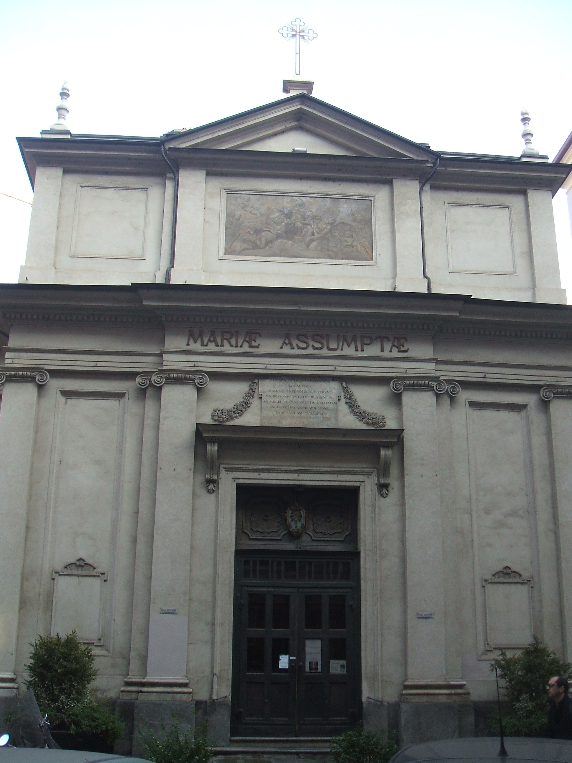 Piemontèis: Cesa 'd Santa Maria 'd Piassa (Turin)